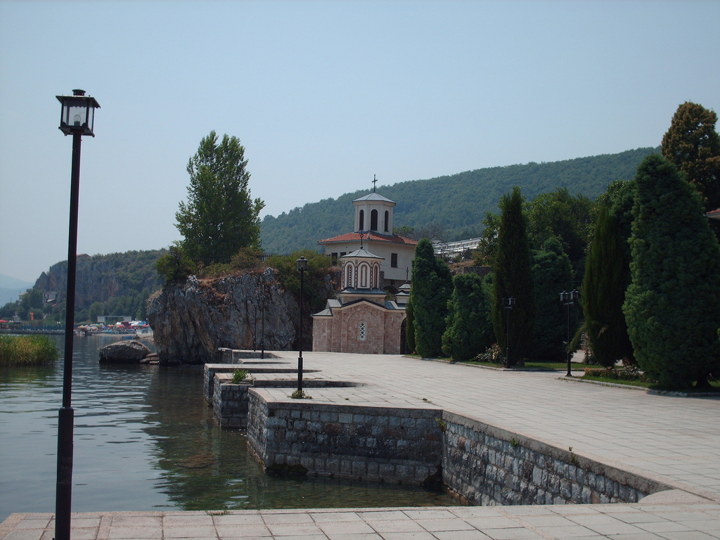 Поглед към манастира „Успение Богородично“ край Калища, Република Македония.